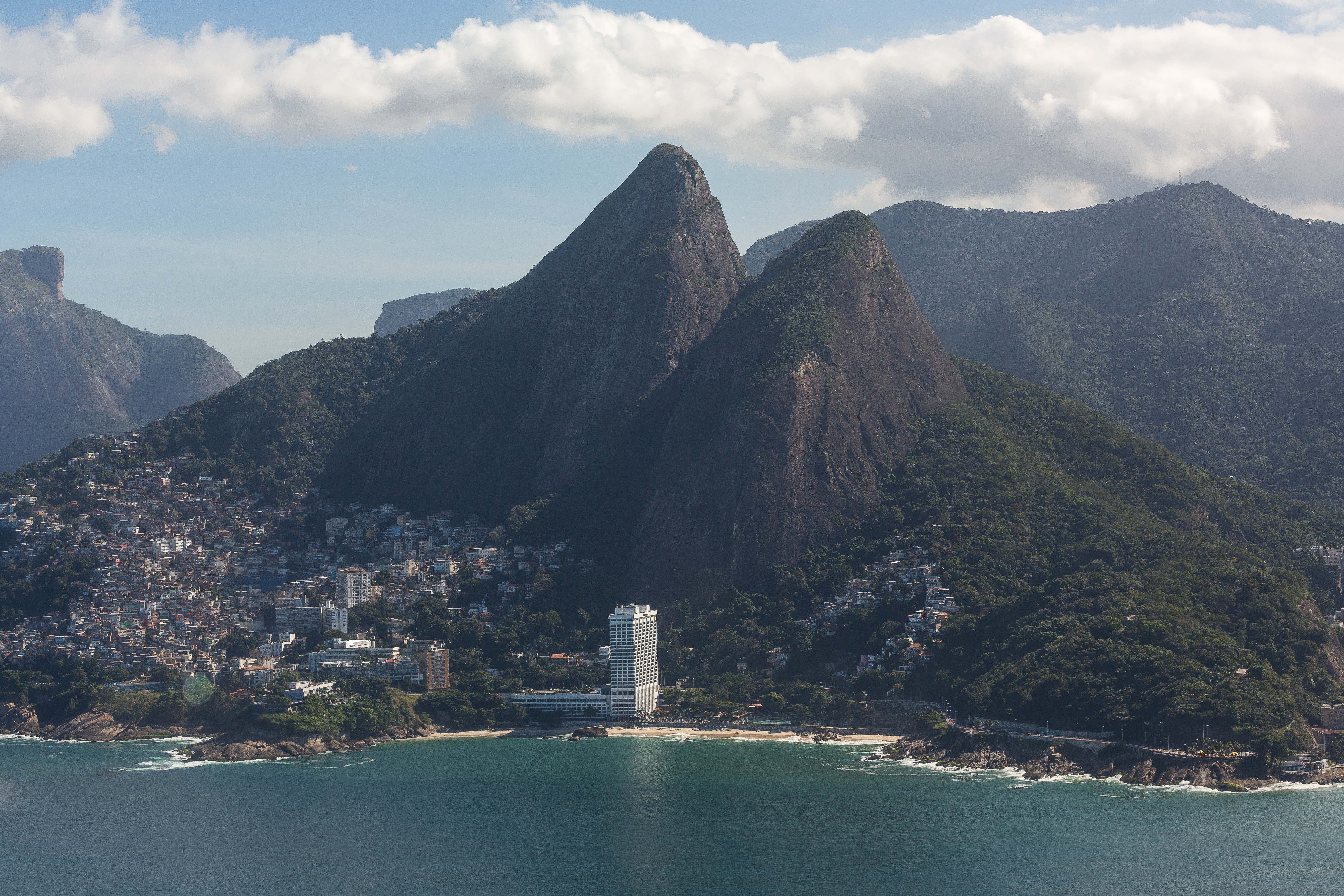 Vista aérea da Praia do Vidigal com o Morro dois Irmãos ao fundo. Rio de Janeiro - RJ - Brasil.